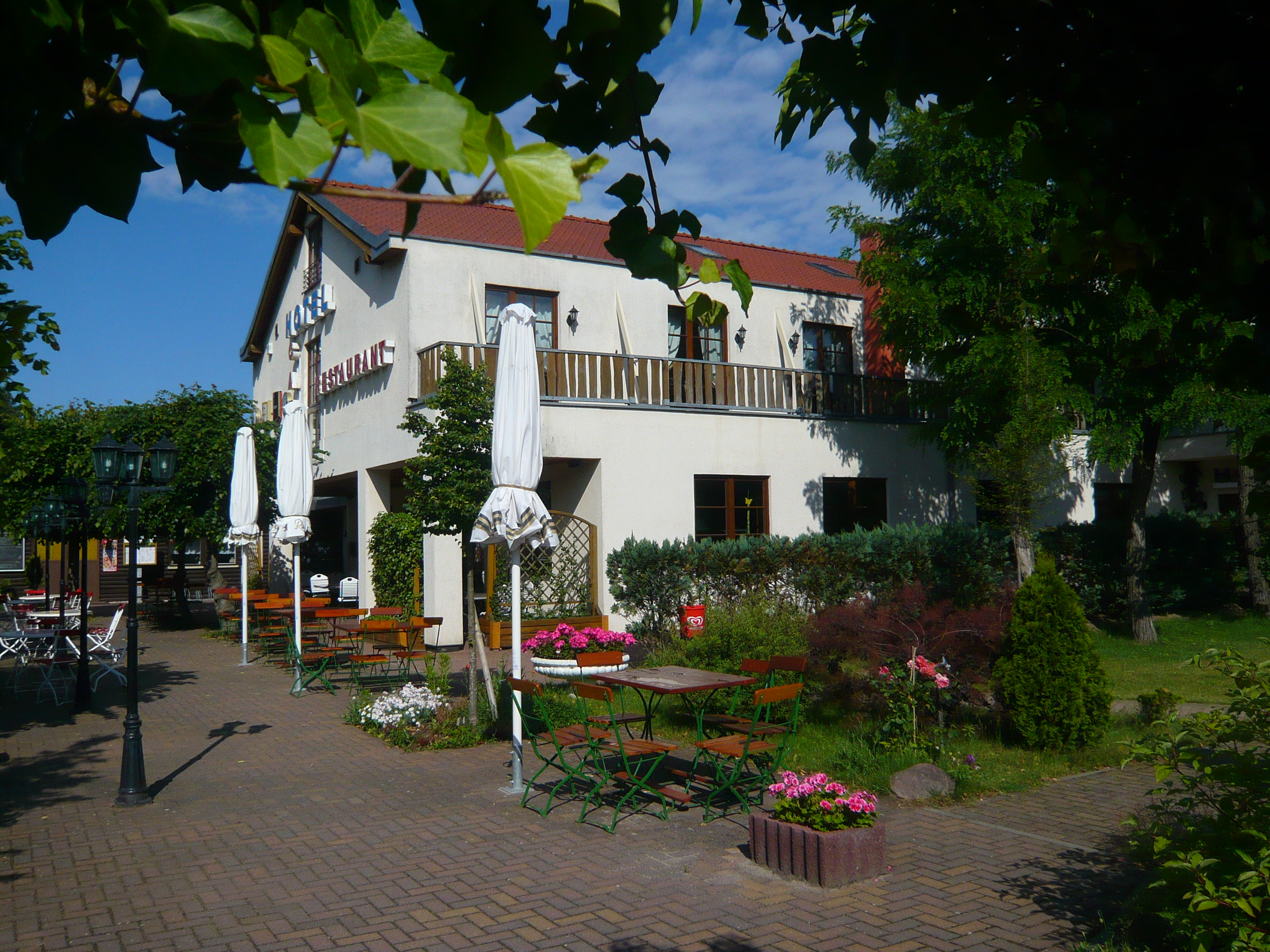 Rahmer See Wandlitz, Hotel-Restaurant "Zur Waldschänke"